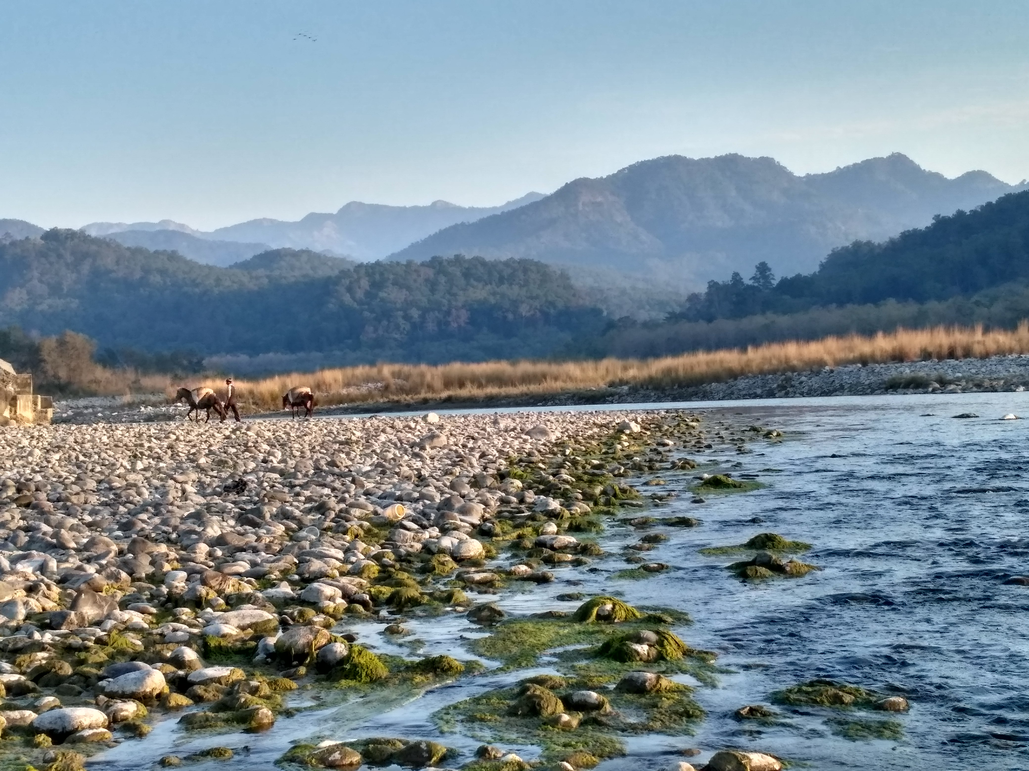 Kosi River, Jim Corbett National Park, Ramnagar, Uttarakhand